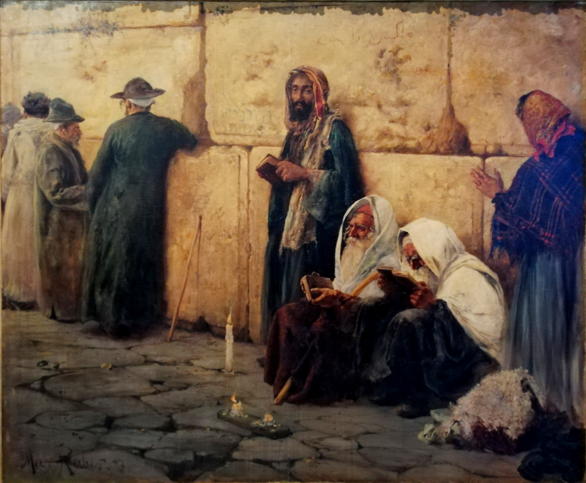 Max Rabes (1868 - 1944) - Wailing wall in Jerusalem